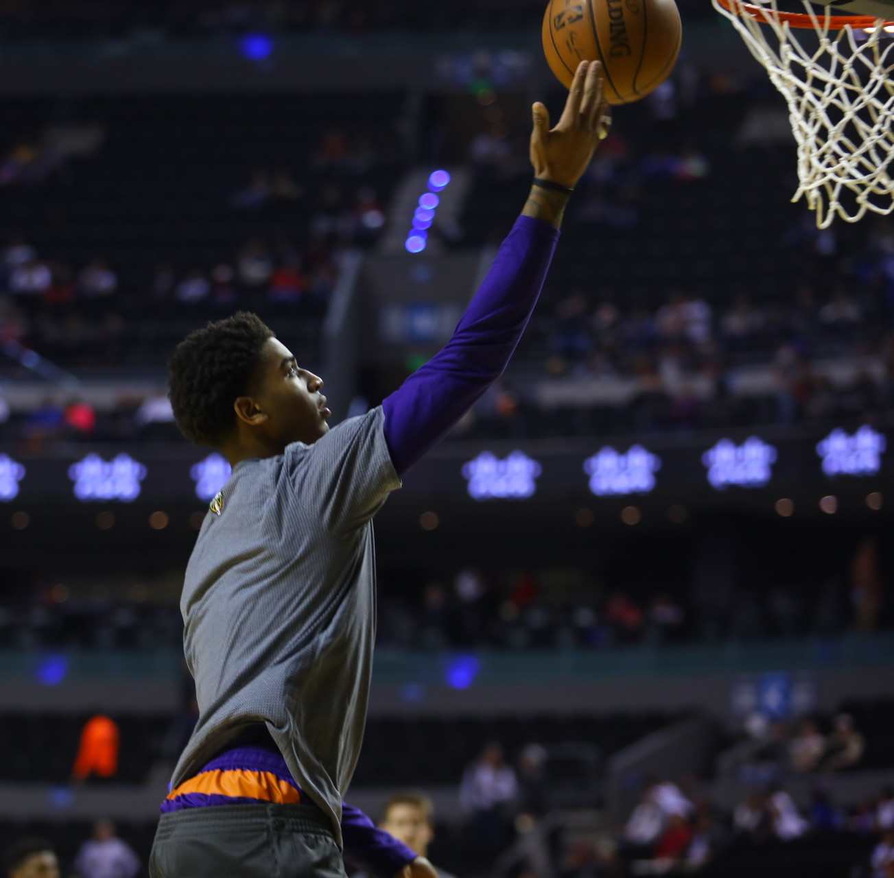 Partido NBA